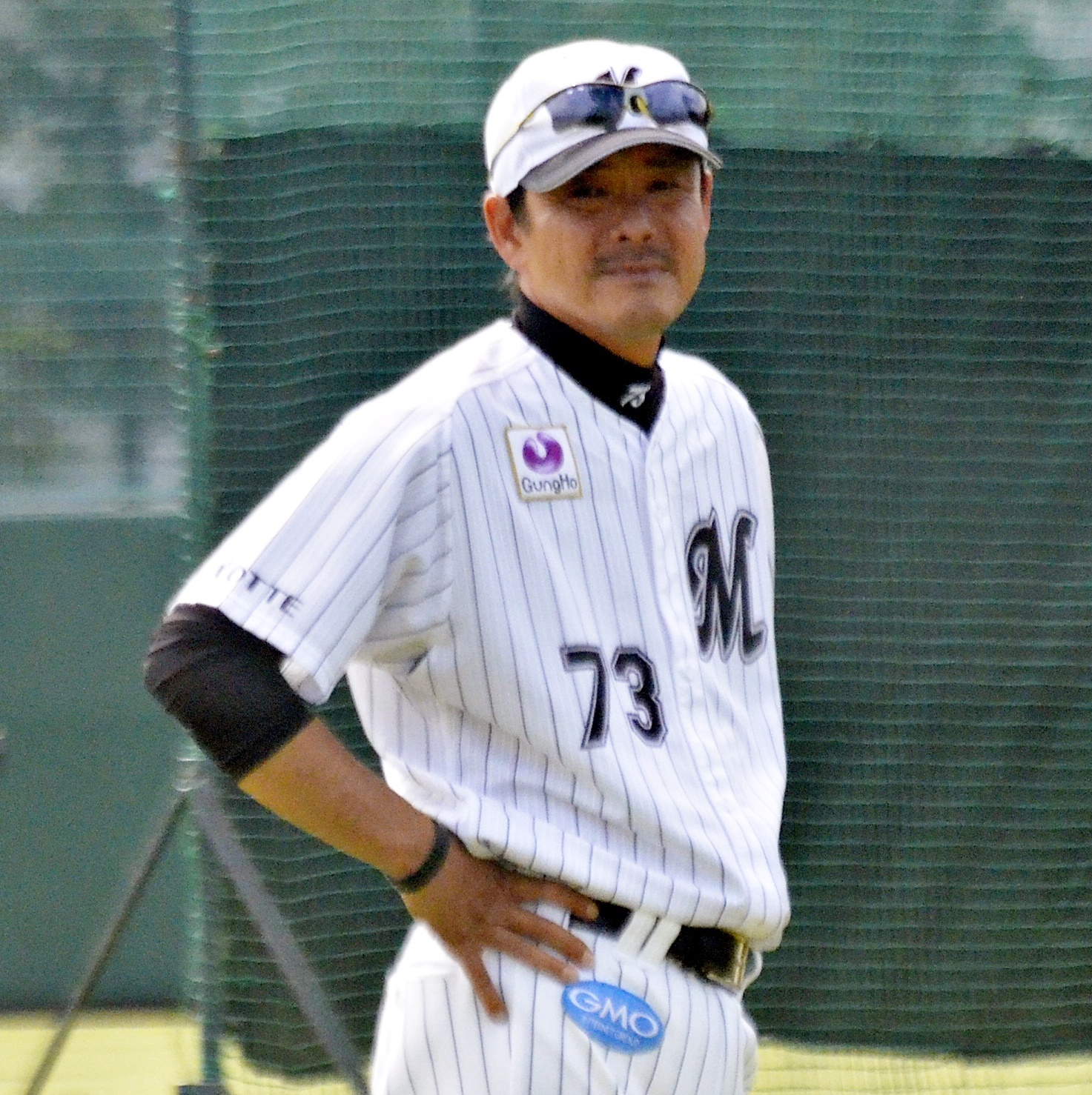 福澤洋一監督